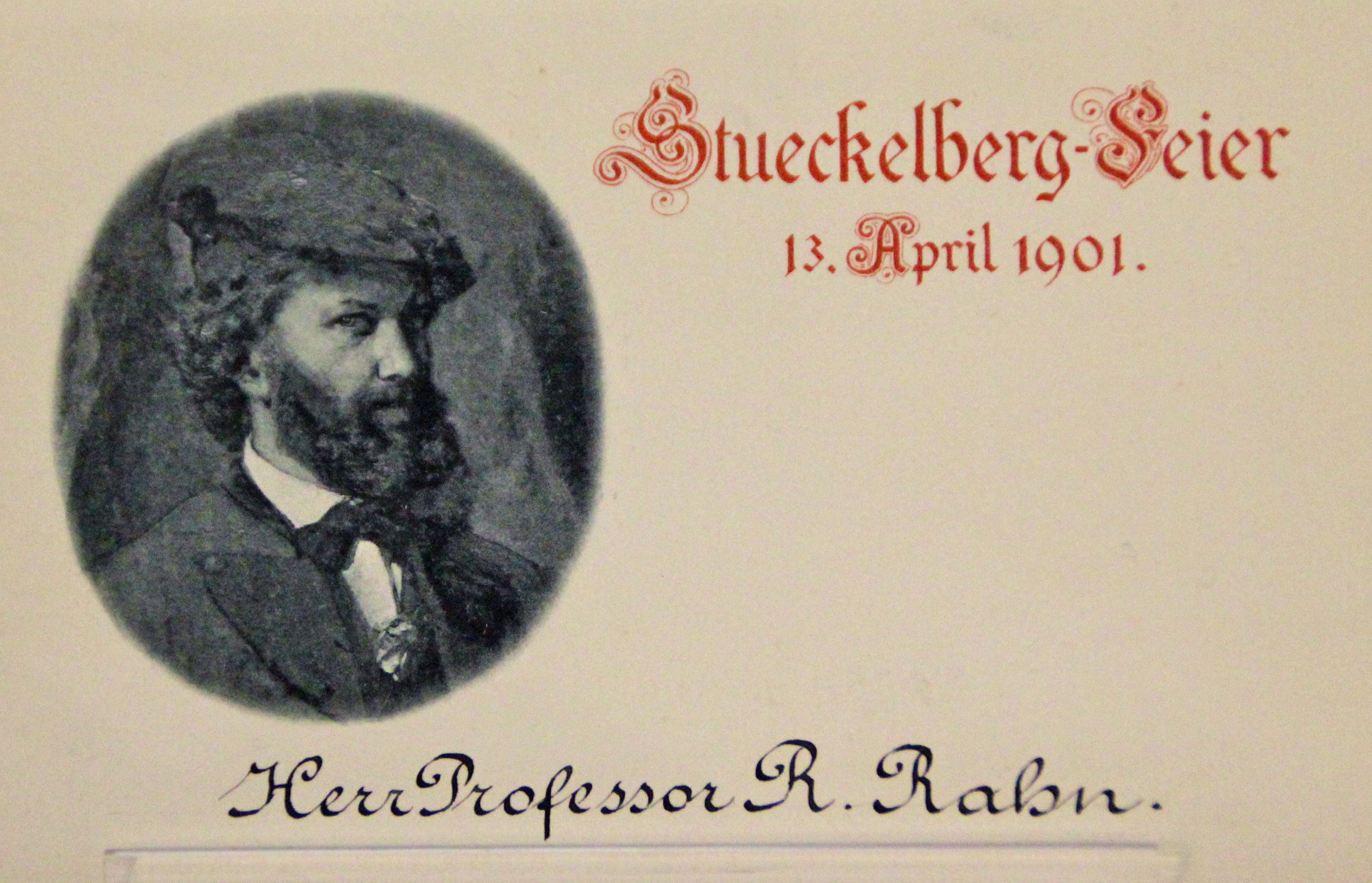 Einladung an Johann Rudolf Rahn für die Feier zum 70. Geburtstag von Ernst Stückelberg 1901